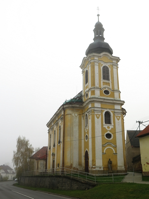 Kostel svatého Štěpána, Kozolupy (okres Plzeň-sever).